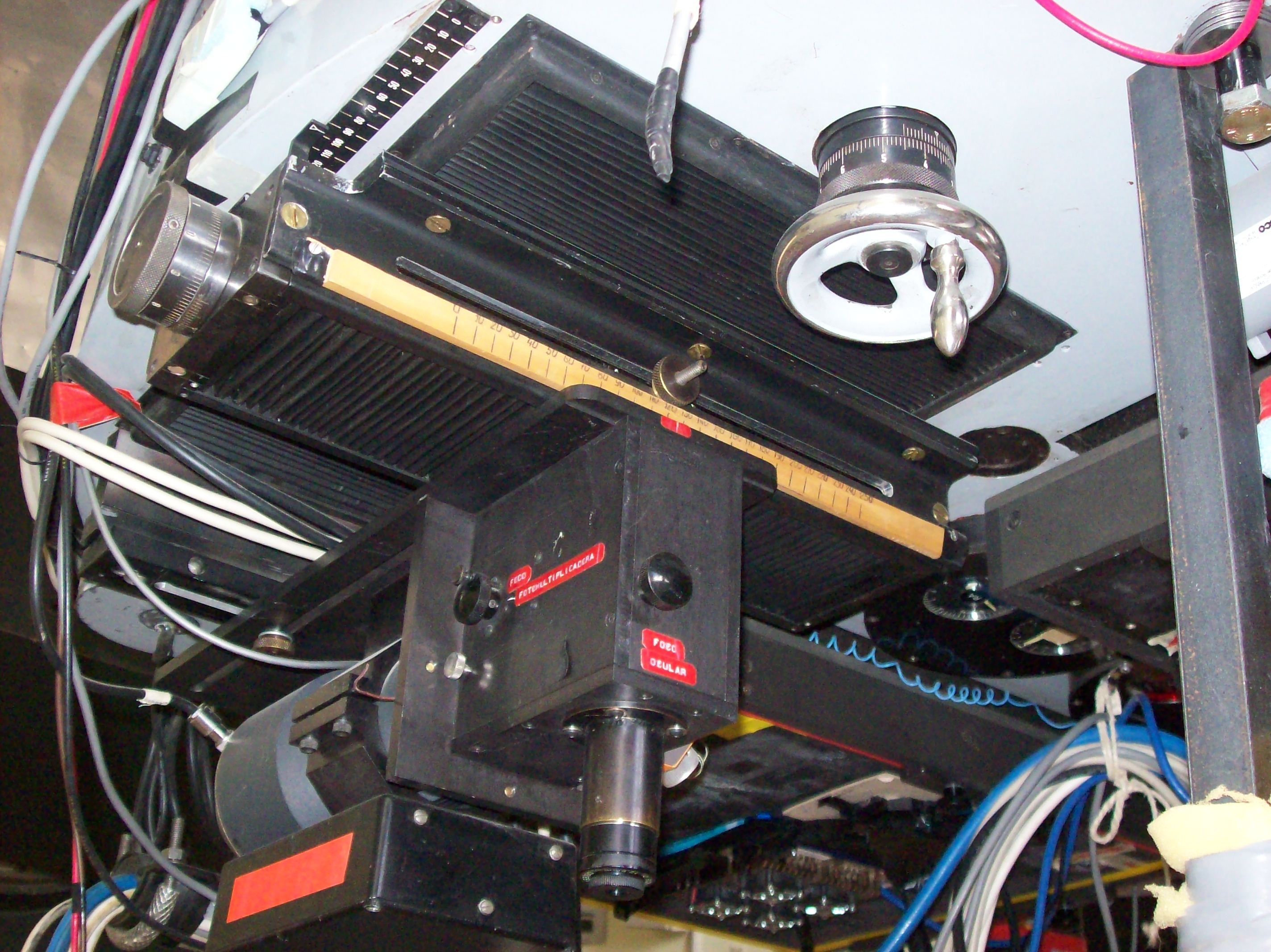 Detalle de la parte inferior del telescopio del Observatorio Carlos Cesco en el Parque Nacional El Leoncito, Departamento Calingasta, Provincia de San Juan, Argentina.